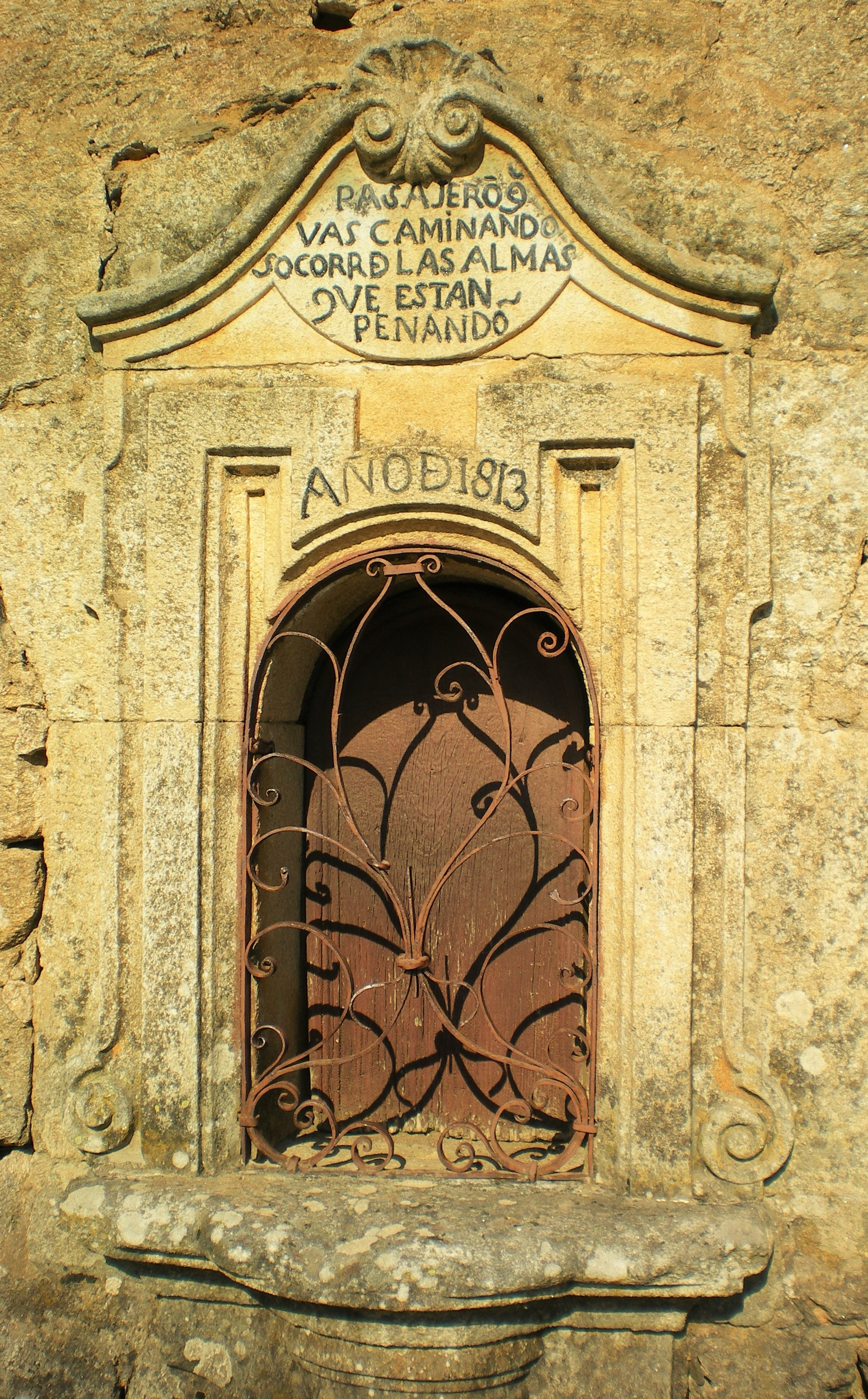 Soutelo Verde - Peto de ánimas de 1813